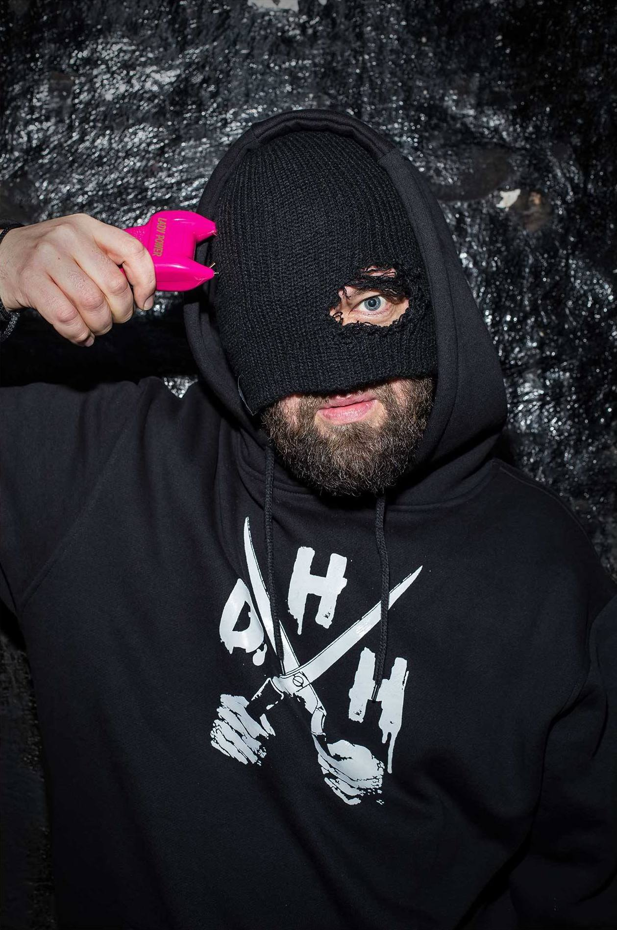 Pressefoto des Rappers Degenhardt